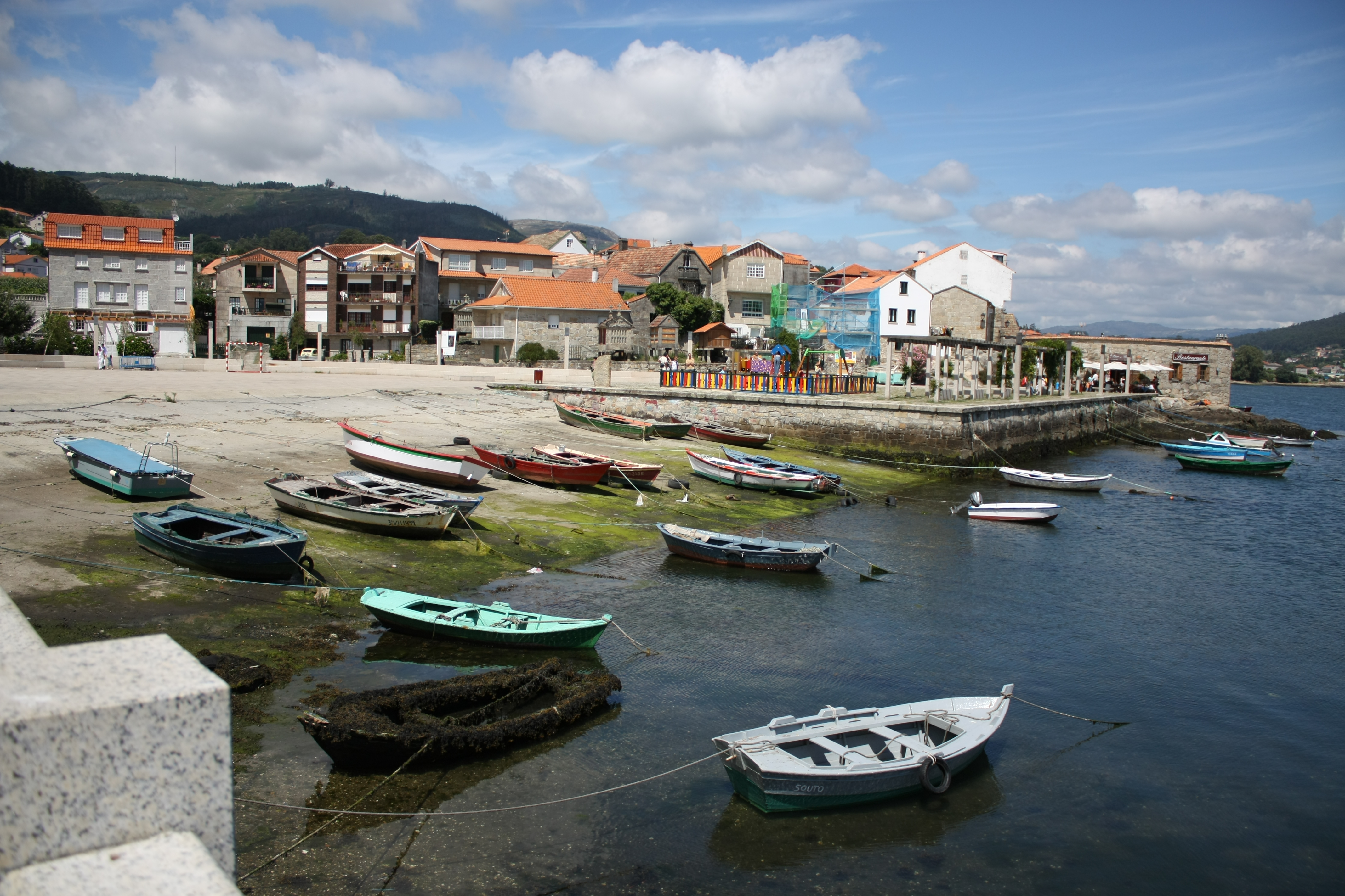 Porto de Combarro - Poio - Pontevedra